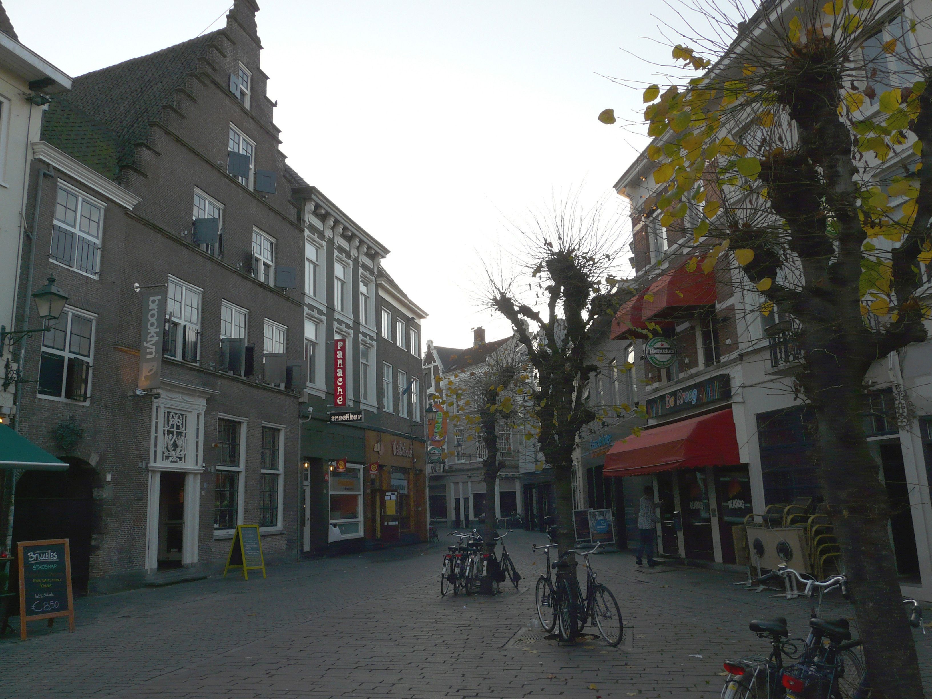 Havermarkt in Breda Centrum